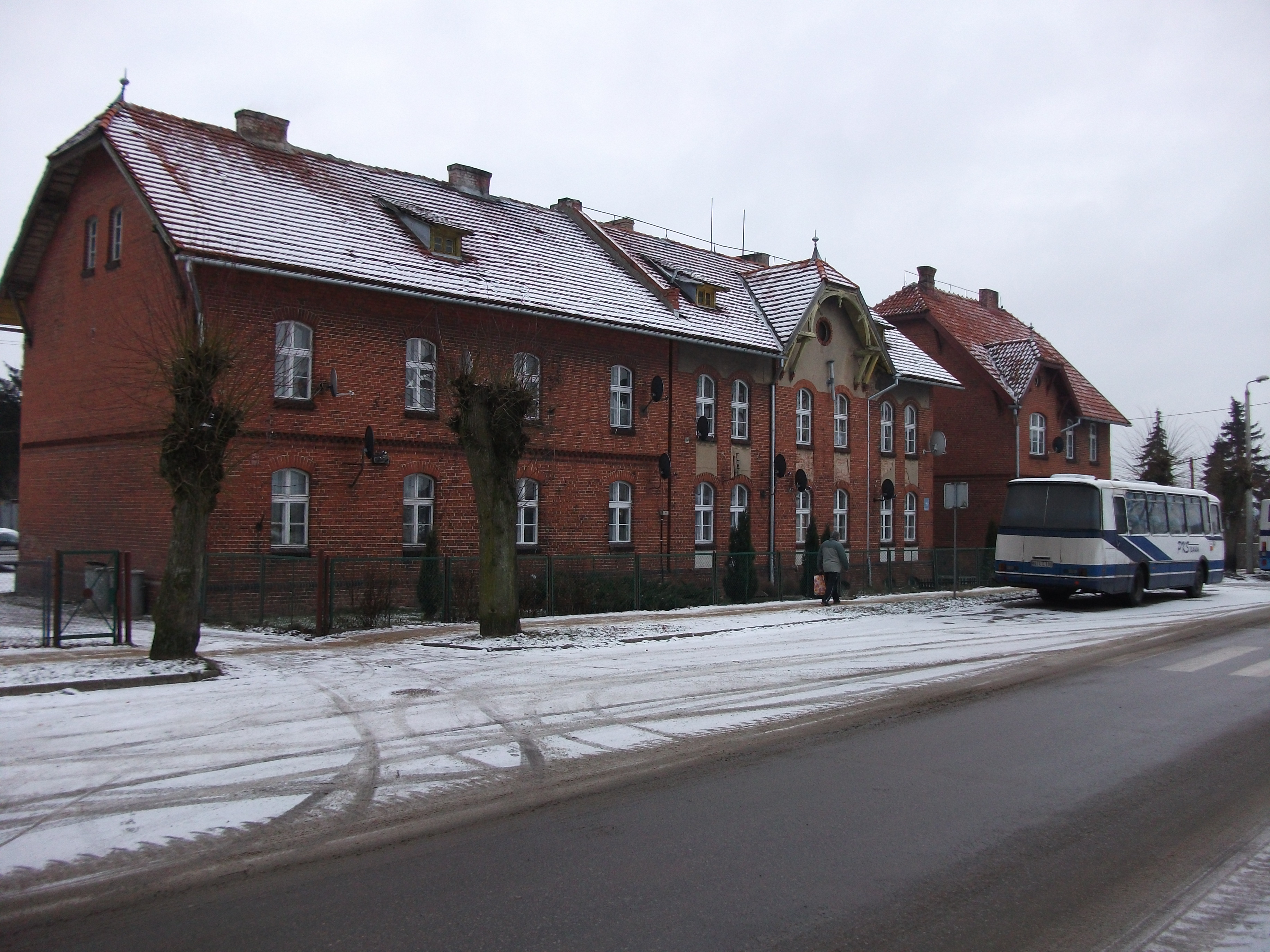 Dworzec w Kisielicach